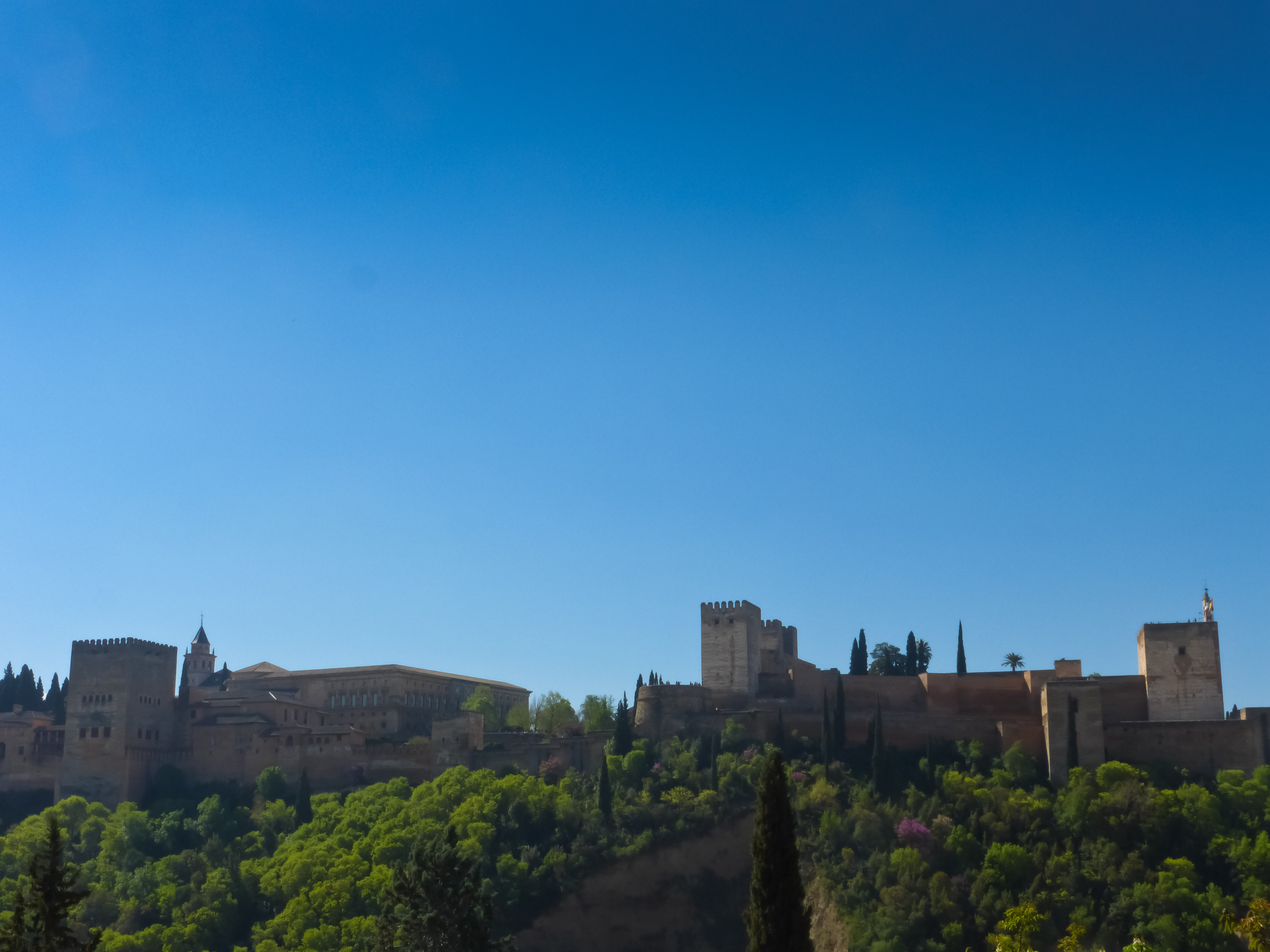 Murallas de la Alcazaba